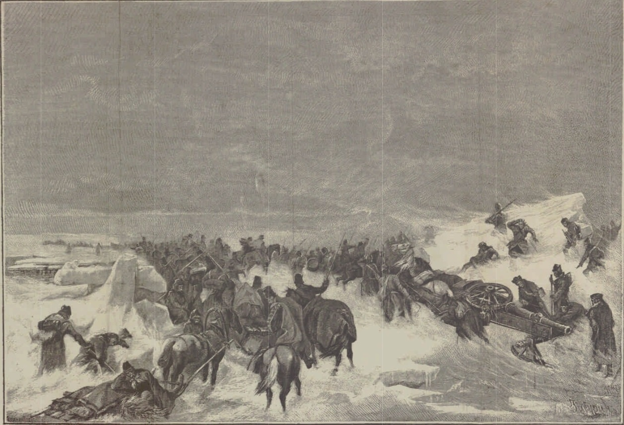 Переход через Кваркен. (С картины художника А. Коцебу). Это изображение было использовано для иллюстрирования статьи «Кваркен» опубликованной в двенадцатом томе «Военной энциклопедии», который был издан книгоиздательским товариществом И. Д. Сытина в 1913 году в столице Российской империи городе Санкт-Петербурге. Более подробное описание к этой картинке можно прочесть в указанной выше статье.